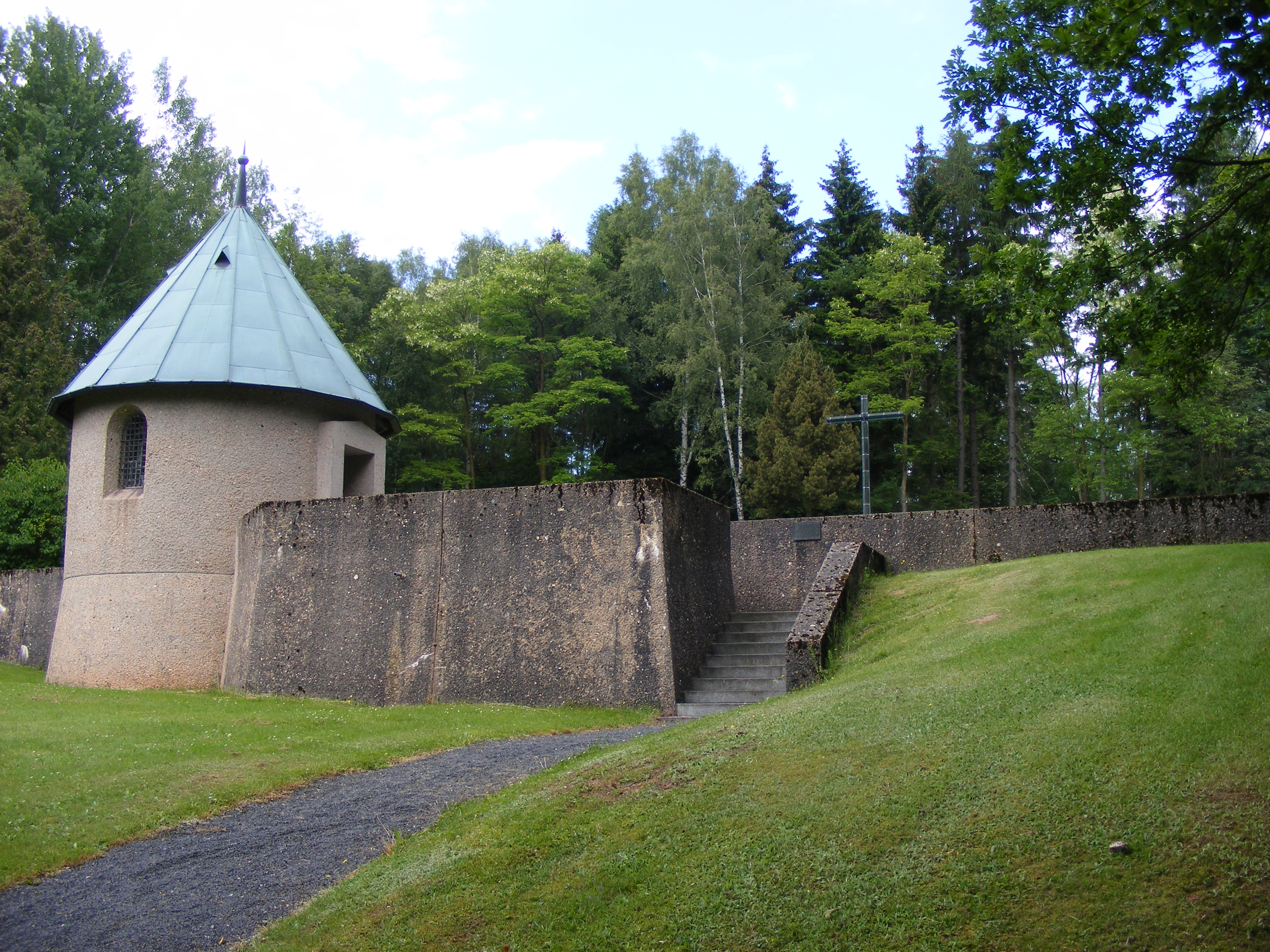 Poolsbegraafplaats bij Wildflecken in de Rhon